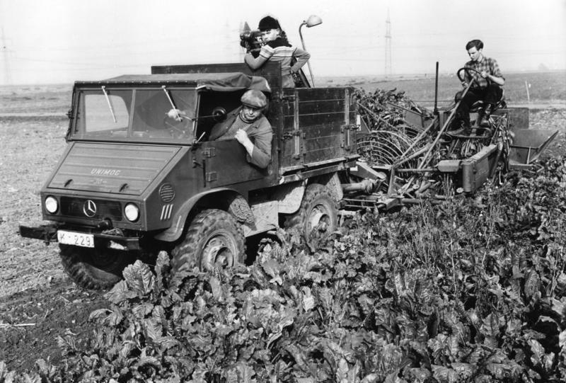 Rübenvollerntemaschine bei der Arbeit auf dem Dikopshof bei Sechtem, 9.10.57 Information added by Wikimedia users.